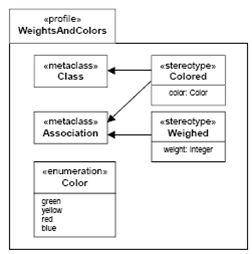 UML perfil baten adibidea